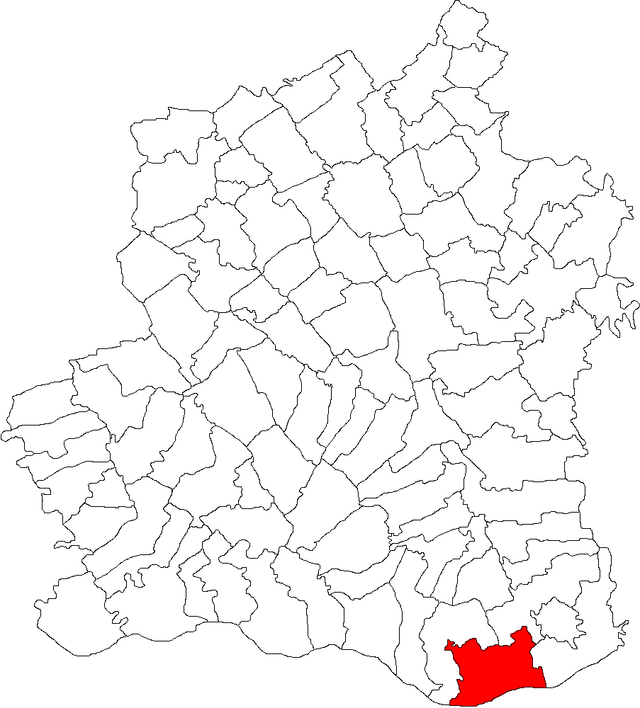 Categorie:Hărţi ale judeţului Teleorman